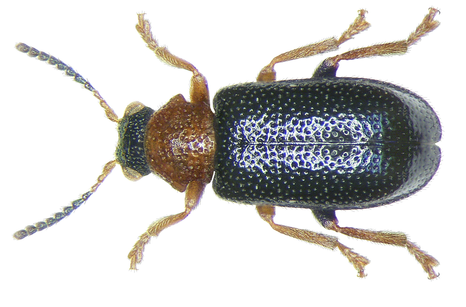 Zeugophora frontalis Suffrian, 1840 Familie: Chrysomelidae Grösse: 2,5-3,5 mm Verbreitung: Europa Ökologie: an Populus tremula Foto: U.Schmidt, 2007